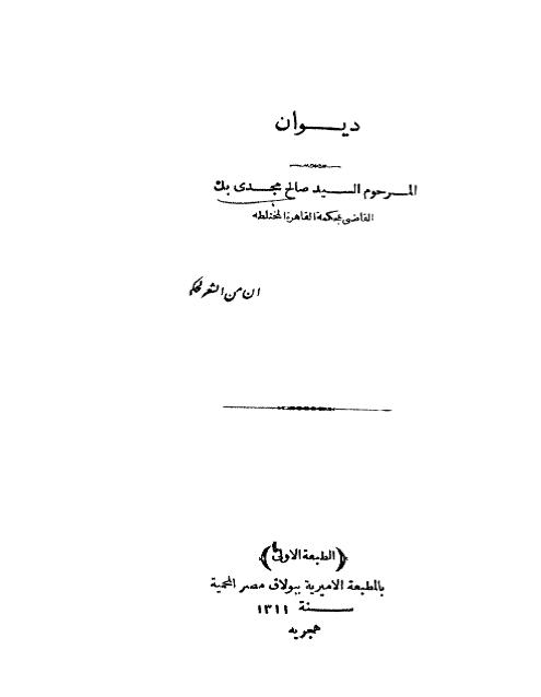 صفحة غلاف ديوان صالح مجدي بك، الصادر سنة 1893 م